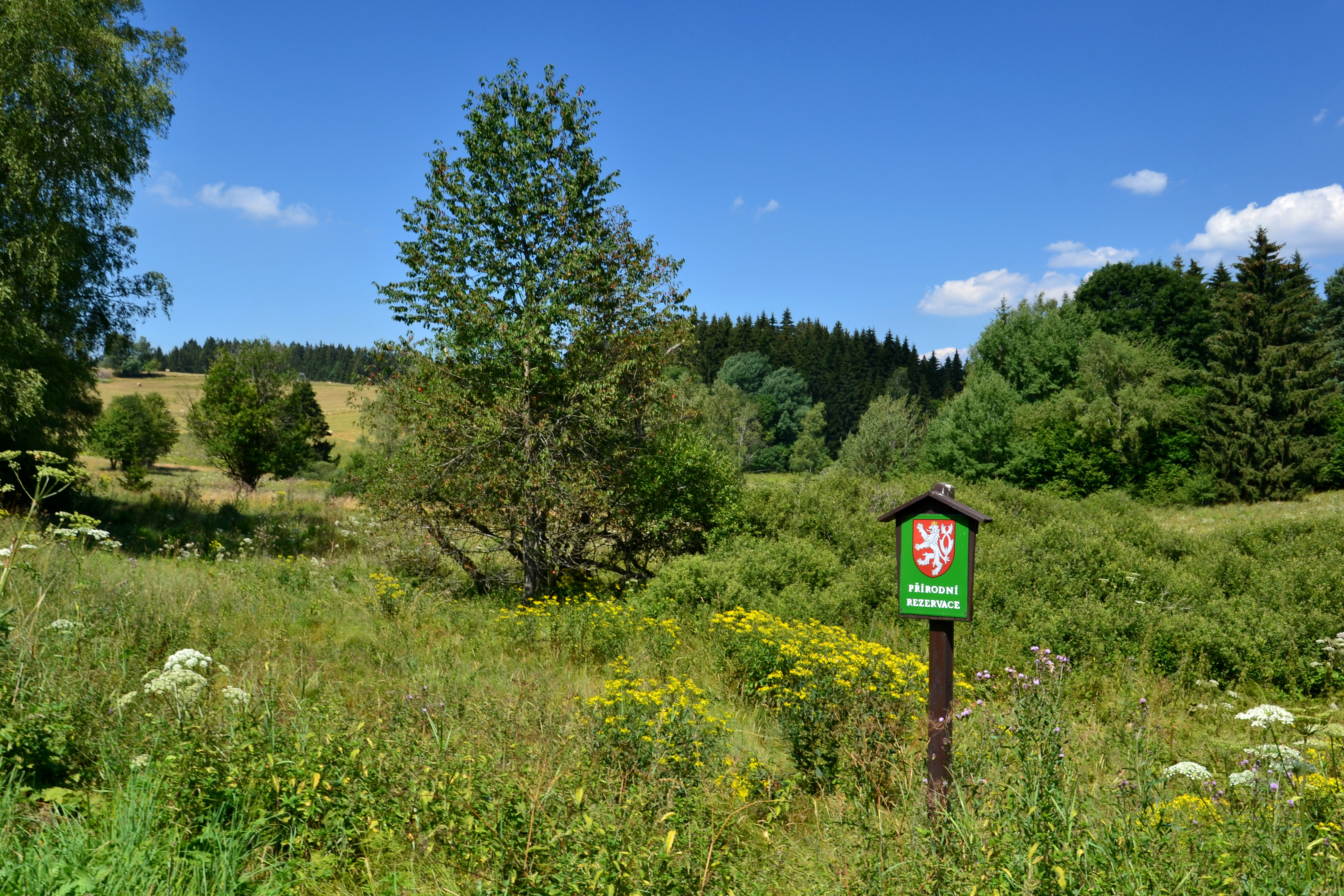 PR Rožnov